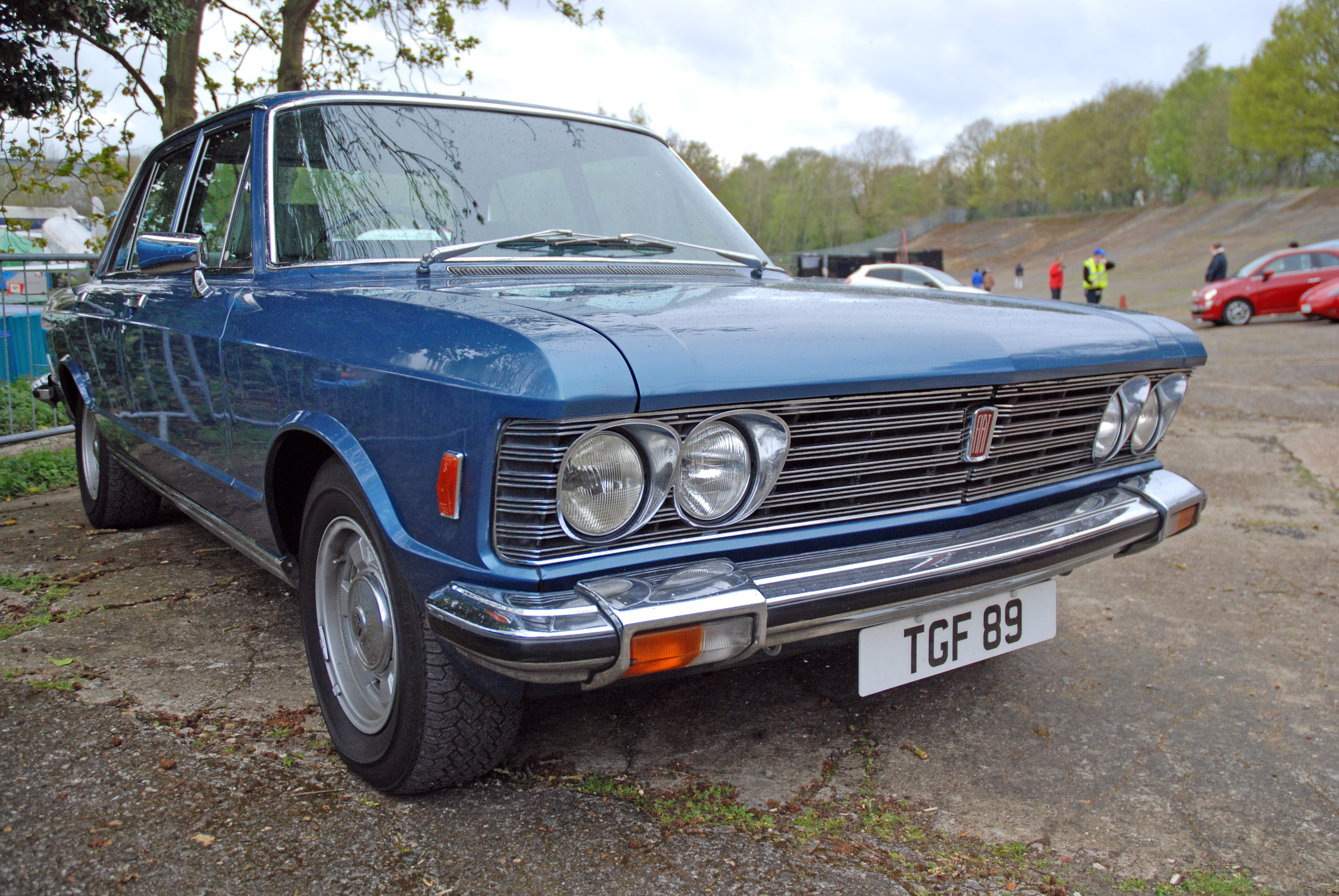 Auto Italia,Brooklands,May 2013